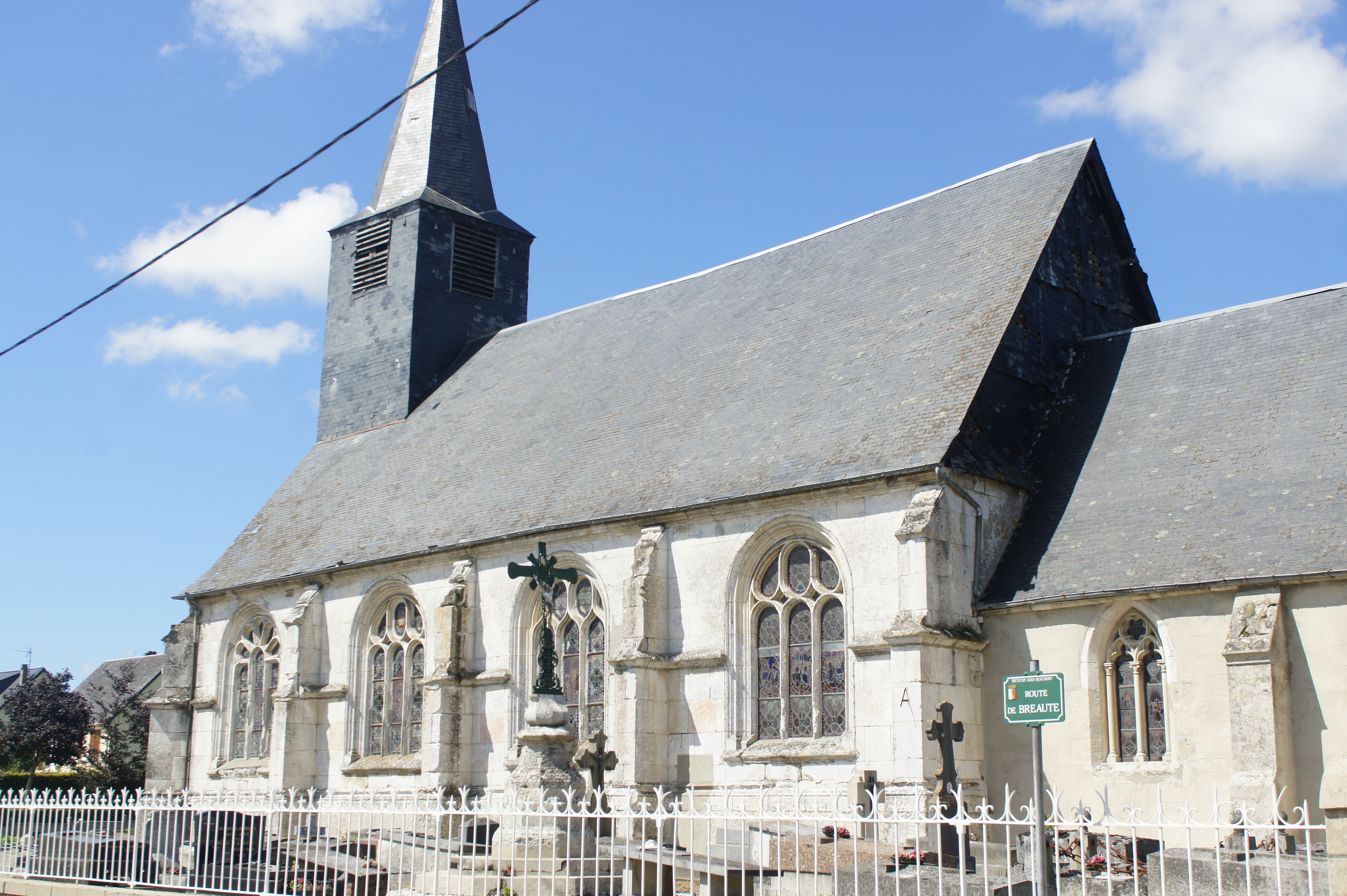 Église de Vattetot-sous-Beaumont